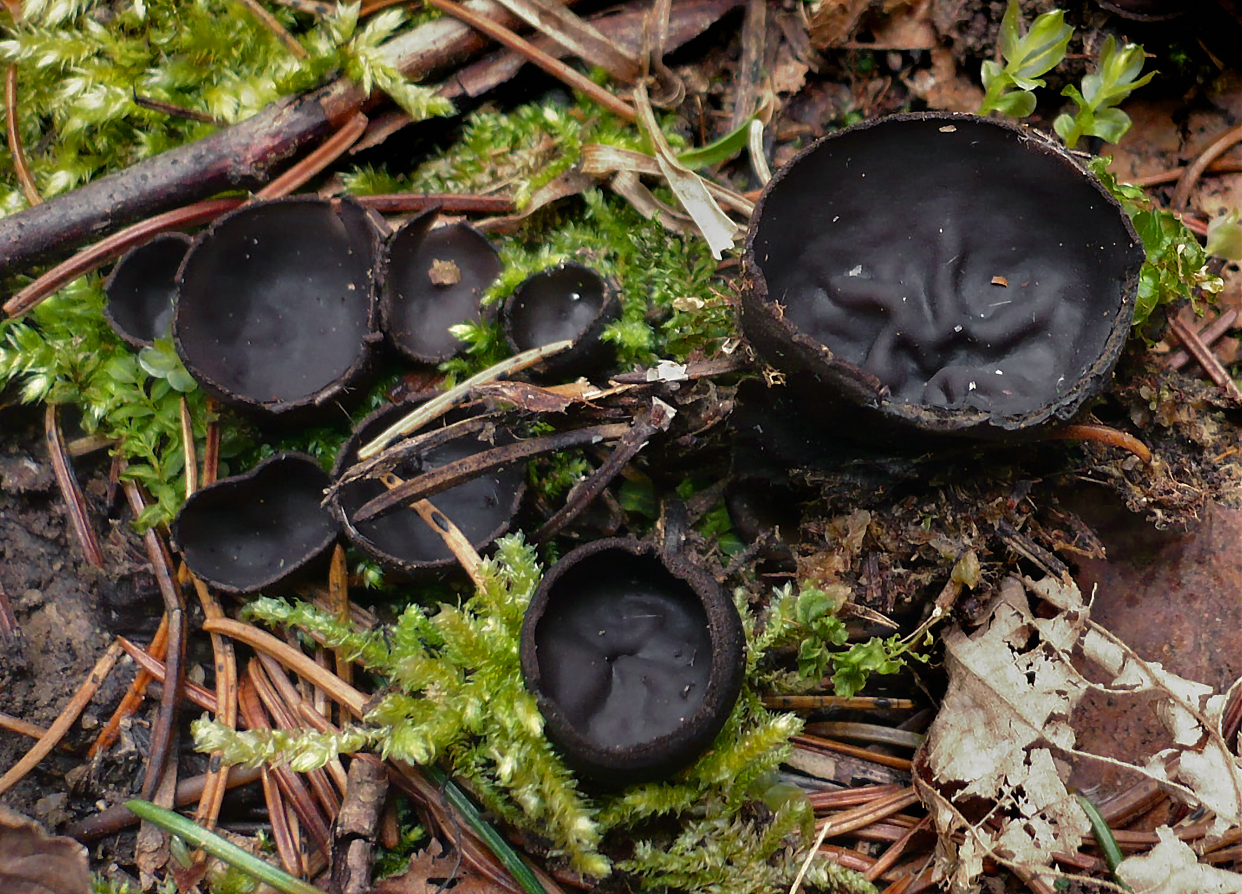 Pseudoplectania nigrella (Pers.) Fuckel Location: Steinereben, Dreistetten, Bezirk Wiener Neustadt, Lower Austria, Austria Observation Notes: also deposited in WU[admin – Sat Aug 14 02:06:25 0000 2010]: Changed location name from ‘Steinereben, Dreistetten, Bezirk Wiener Neustadt, Lower Austria,Austria’ to ‘Steinereben, Dreistetten, Bezirk Wiener Neustadt, Lower Austria, Austria’ For more information about this, see the observation page at Mushroom Observer.